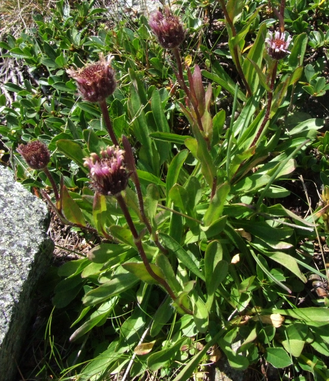 Erigeron hungaricus